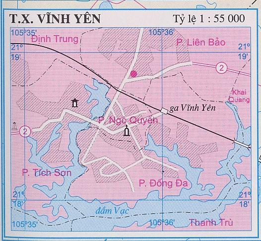 Bản đồ thị xã Vĩnh Yên, Vĩnh Phúc, Việt Nam